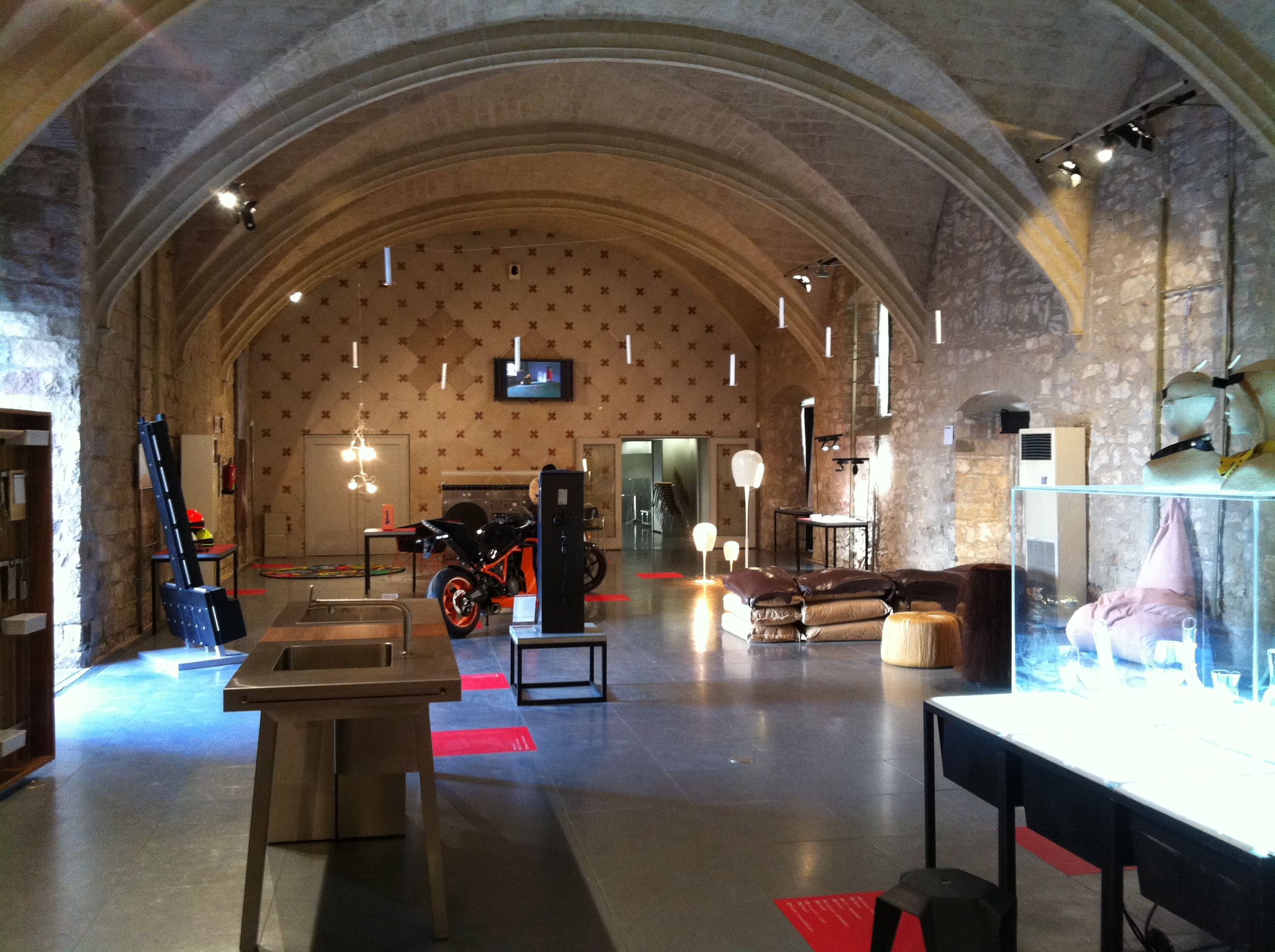 Foment de les Arts i el Disseny